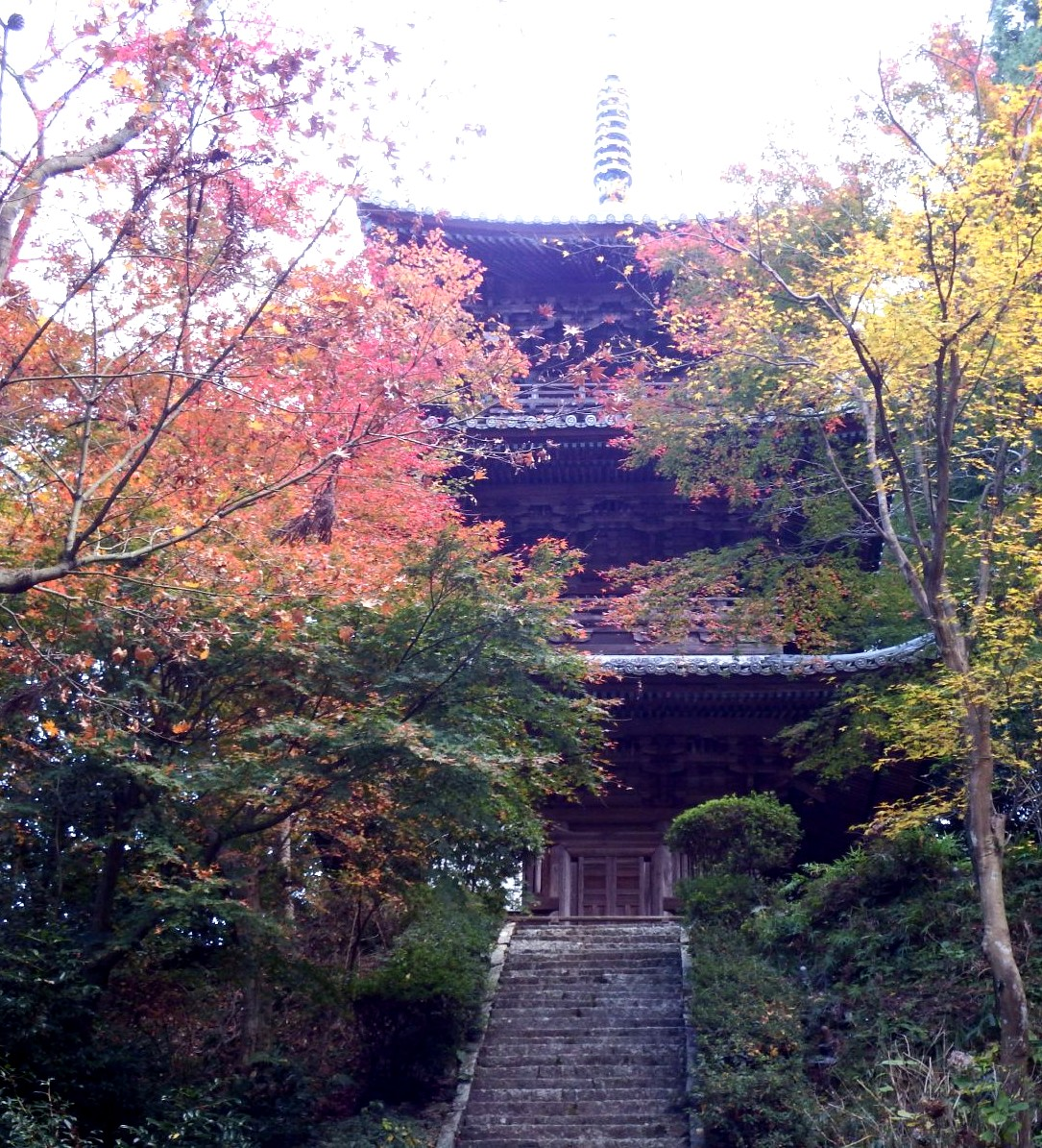 西山興隆寺の三重塔